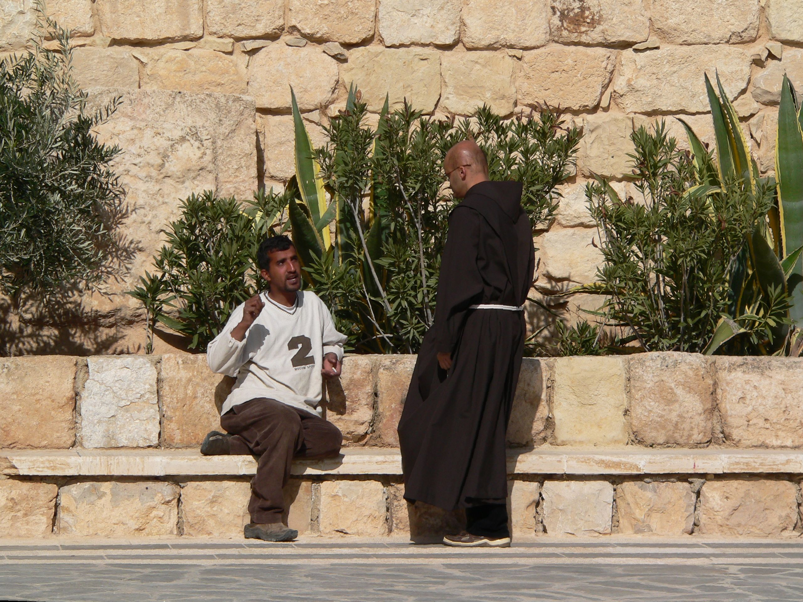 M Disdero 21/02/2007 Garden of Mount Nebo